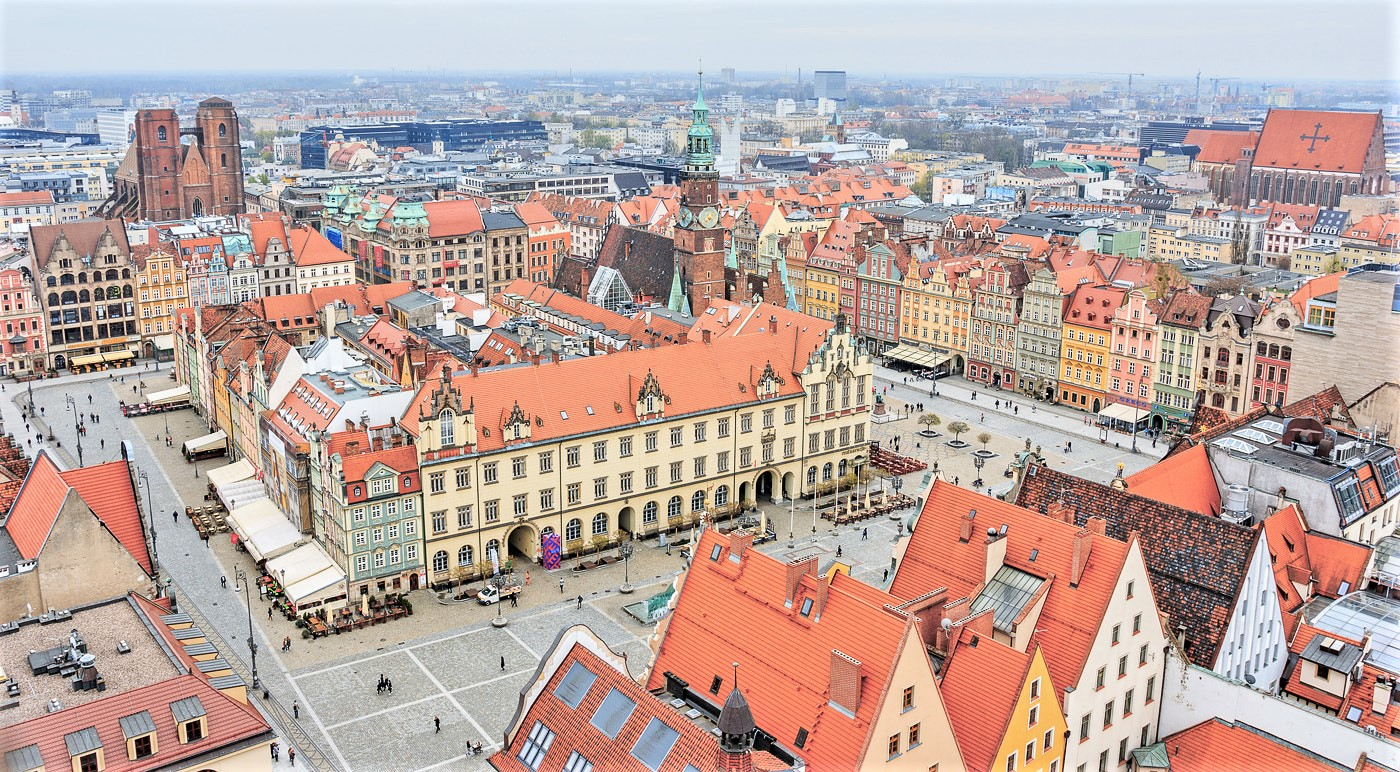 500px provided description: Rynek starego miasta we Wroc?awiu Zdj?cie do wykorzystania komercyjnego i niekomercyjnego. Prosimy o oznaczenie HRS Poland jako autora zdj?cia. Na przyk?ad: ?r?d?o: ?r?d?o: HRS Poland - Wroc?aw Please tag HRS Poland as a source. For example: Source: HRS Poland - Wroclaw [#poland ,#old town ,#rynek ,#wroc?aw ,#star?wka ,#stare miasto]